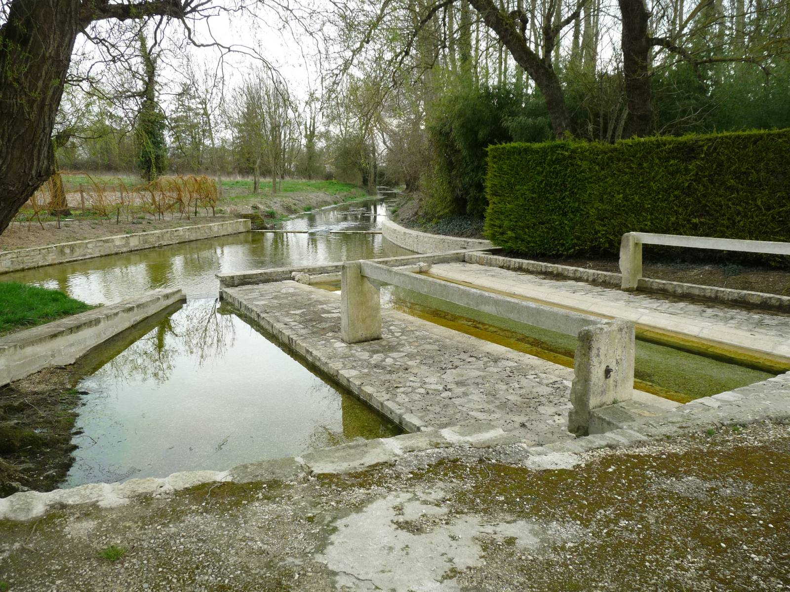 lavoirs et fontaine de Brie-sous-Matha, Charente-Maritime, France